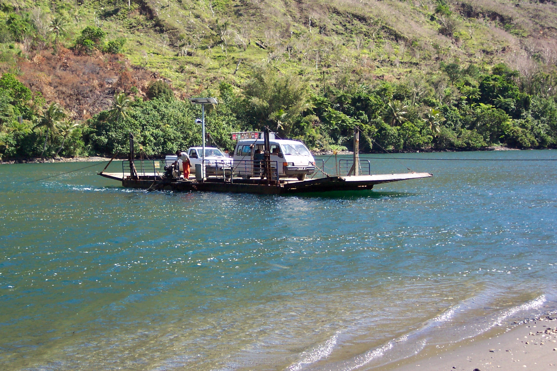 Nouvelle-Calédonie Hienghène le bac sur la Ouaieme photo personnelle libre de droits - free license picture